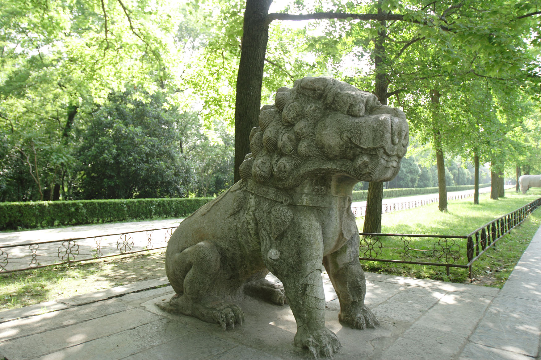 Ming Xiaoling Mausoleum; 明孝陵 at Nanjing